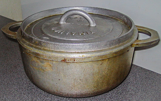 Photo d'une marmite traditionnelle de la Réunion.